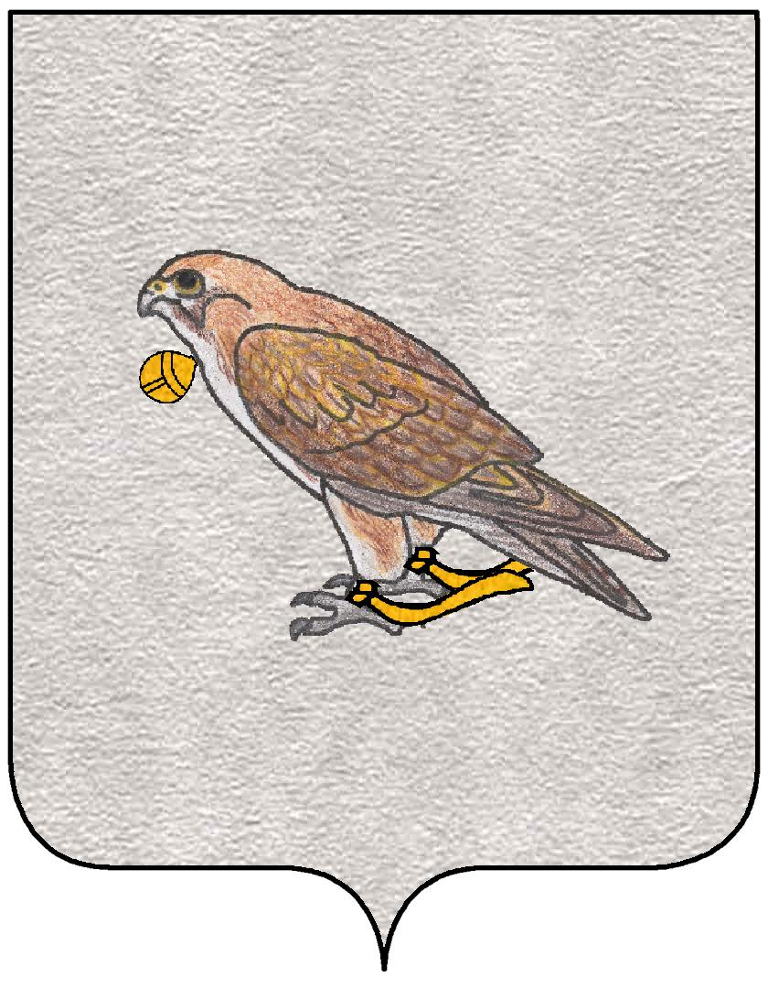 Stemma della famiglia Falconieri